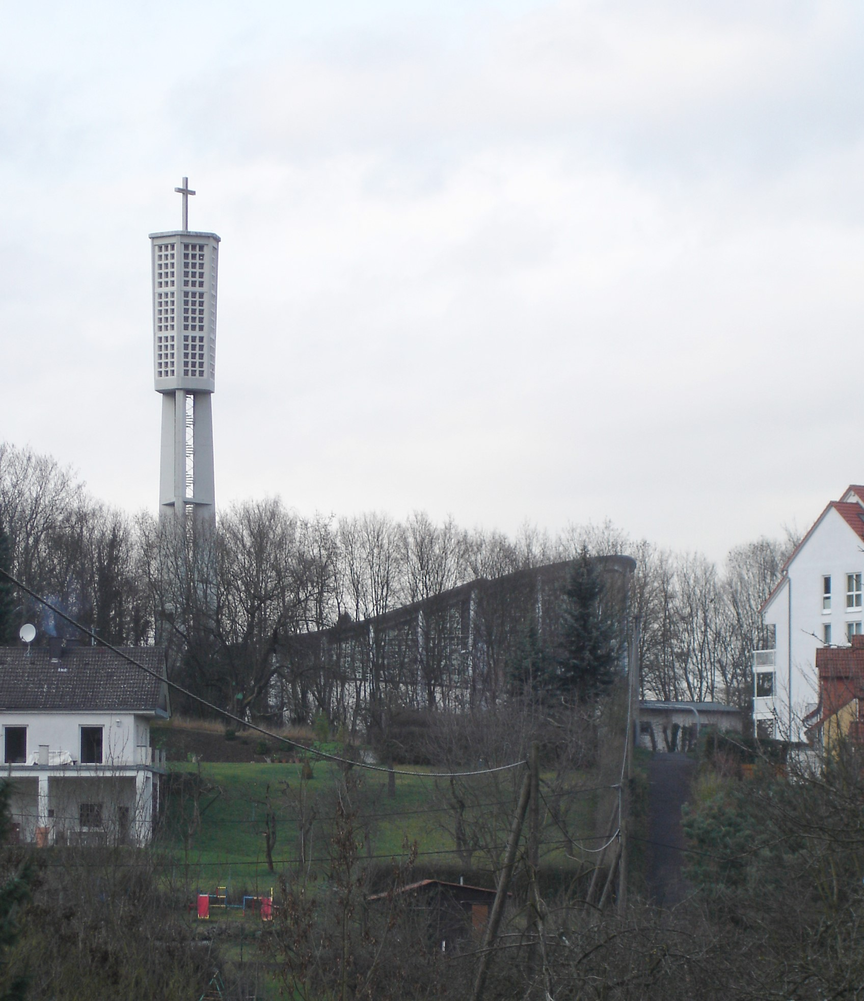 Kirche "Verklaerung Christi", Bad Vilbel-Heilsberg